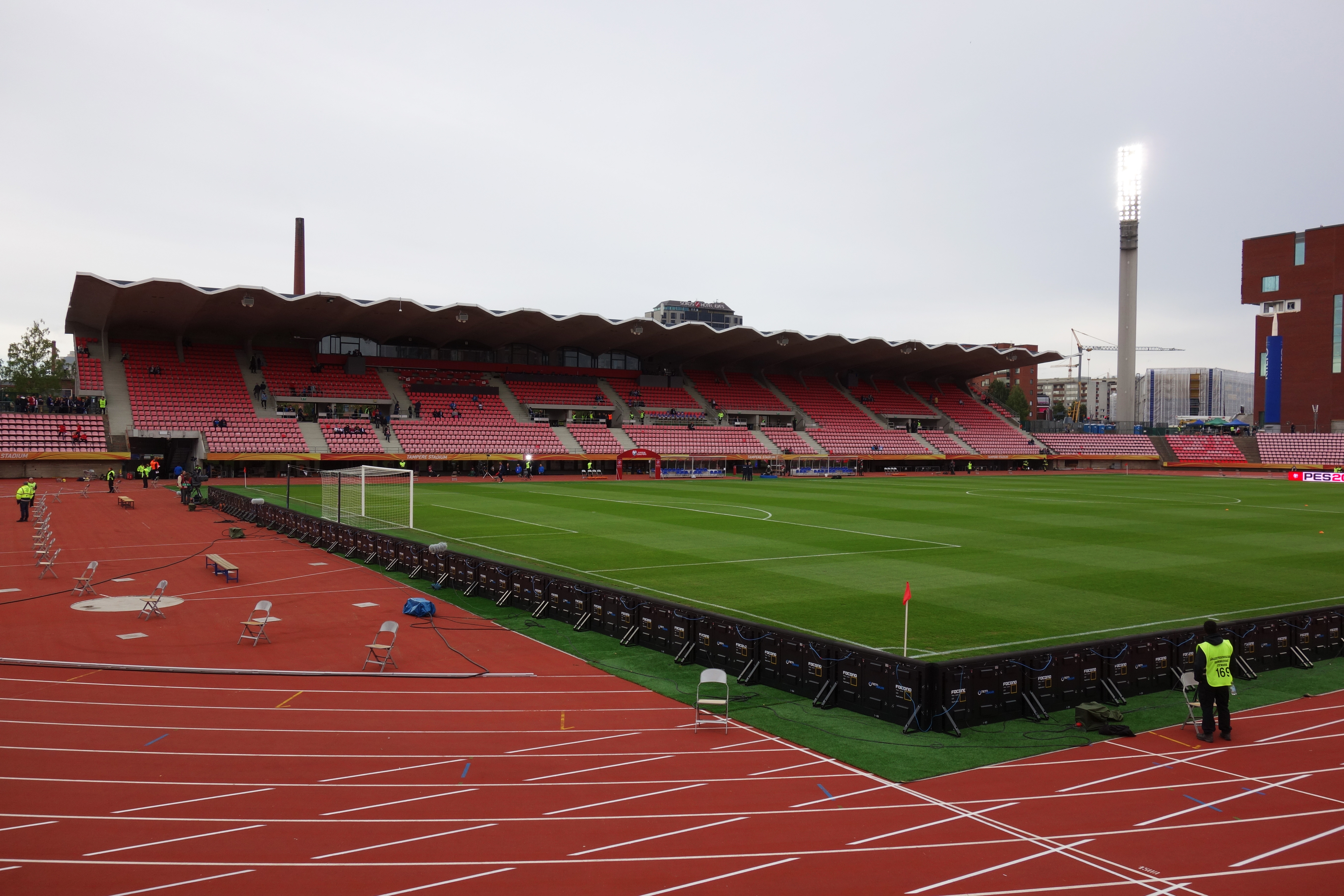 Tampereen stadion 2.9.2017